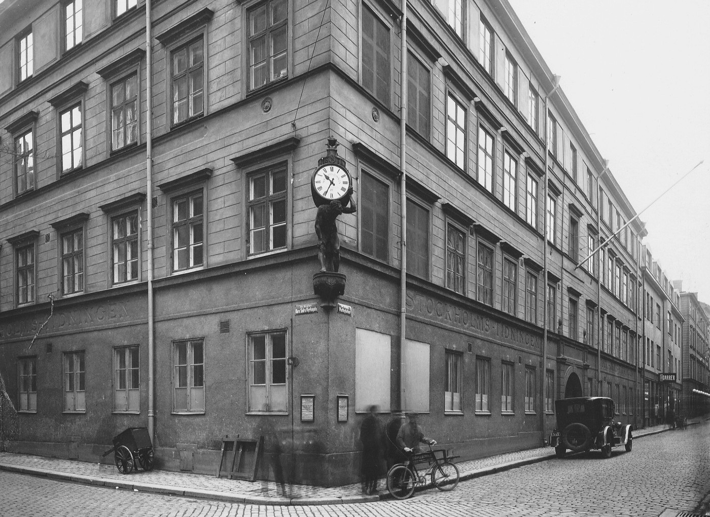 Stockholmstidningens hus, kvarteret Svalan, Klara södra kyrkogata 16 / Vattugatan 12